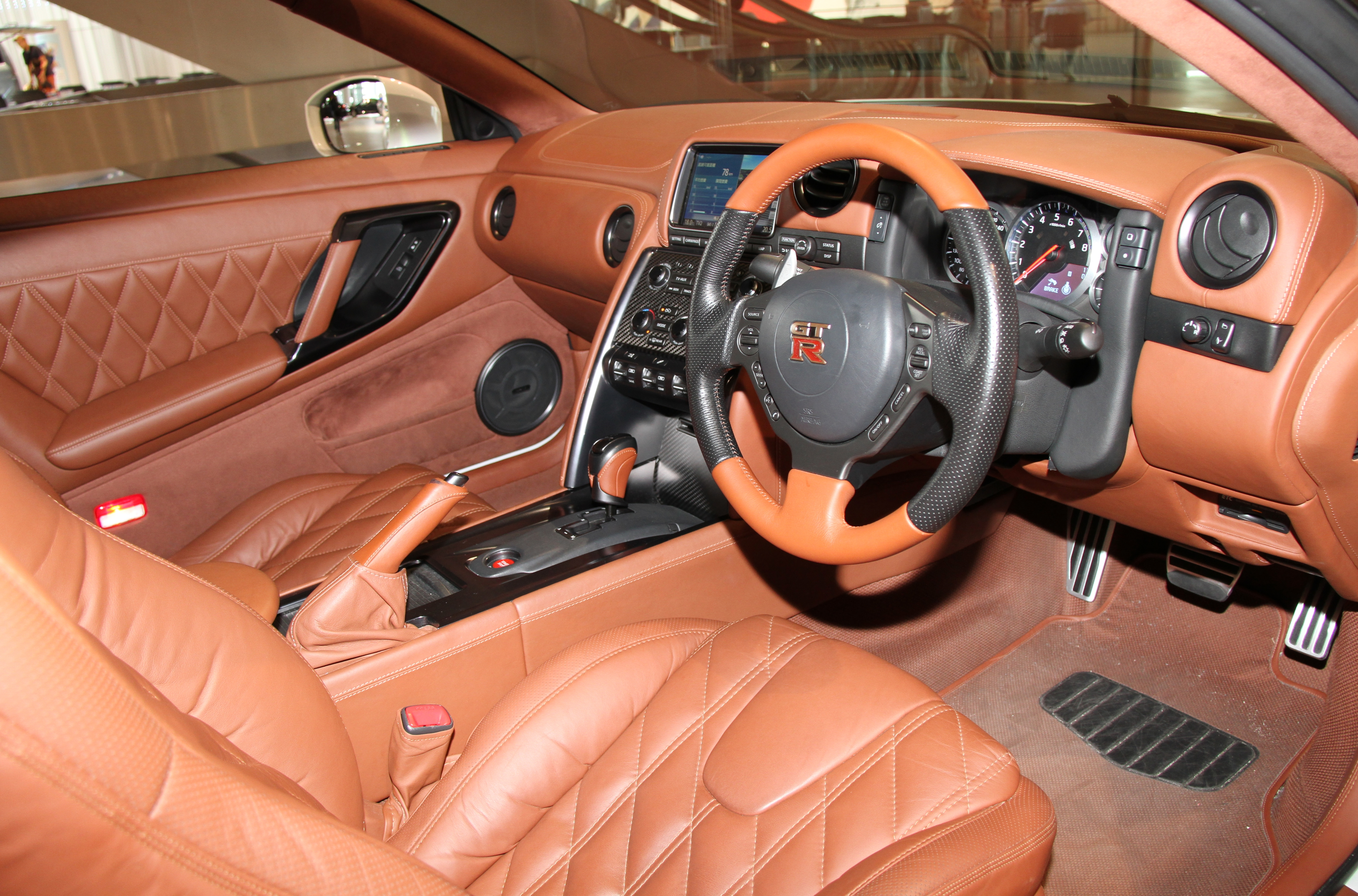 Nissan GT-R